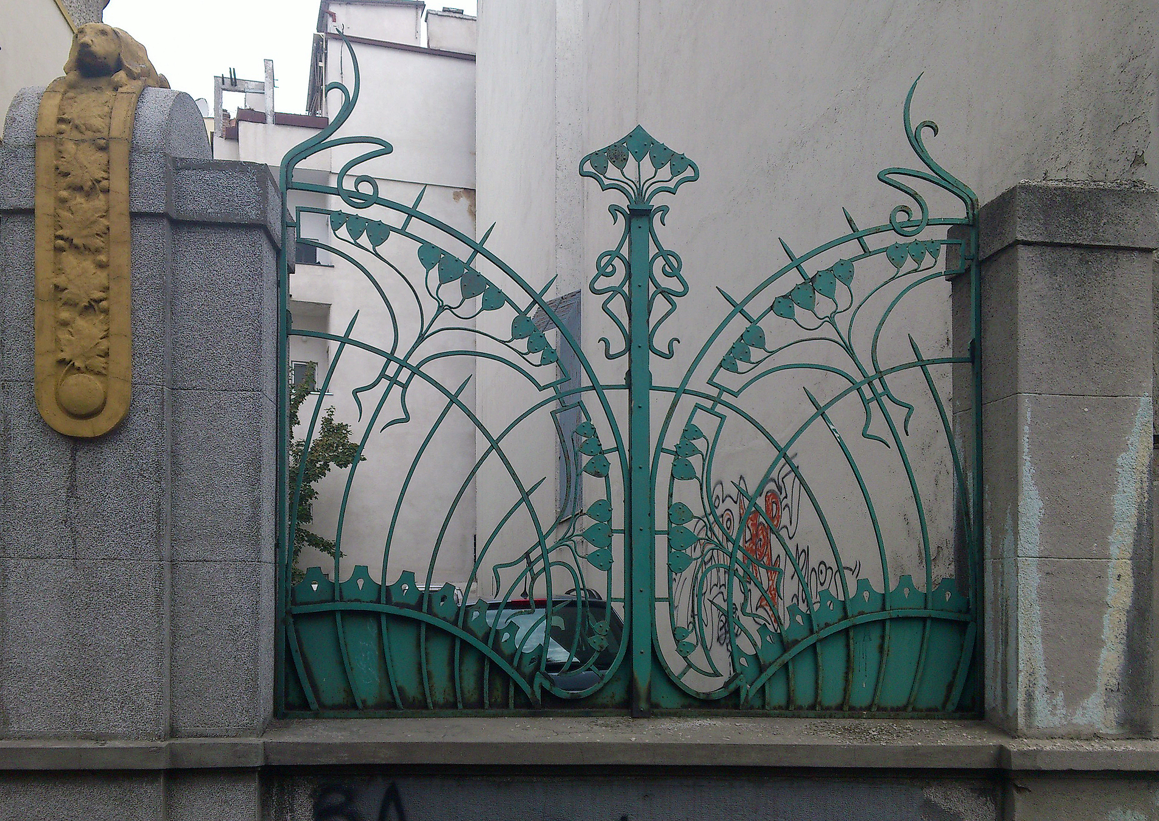 Beograd kuća Leone Panajot Francuska 31